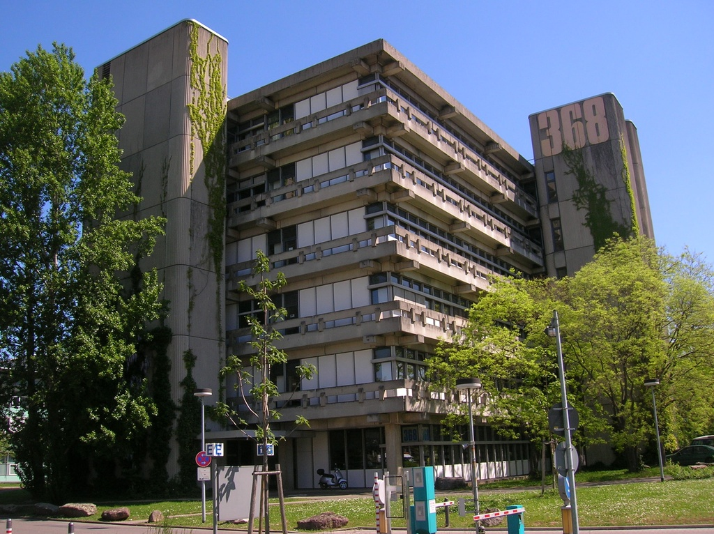 Ansicht des Interdisziplinären Zentrums für Wissenschaftliches Rechnen, Heidelberg